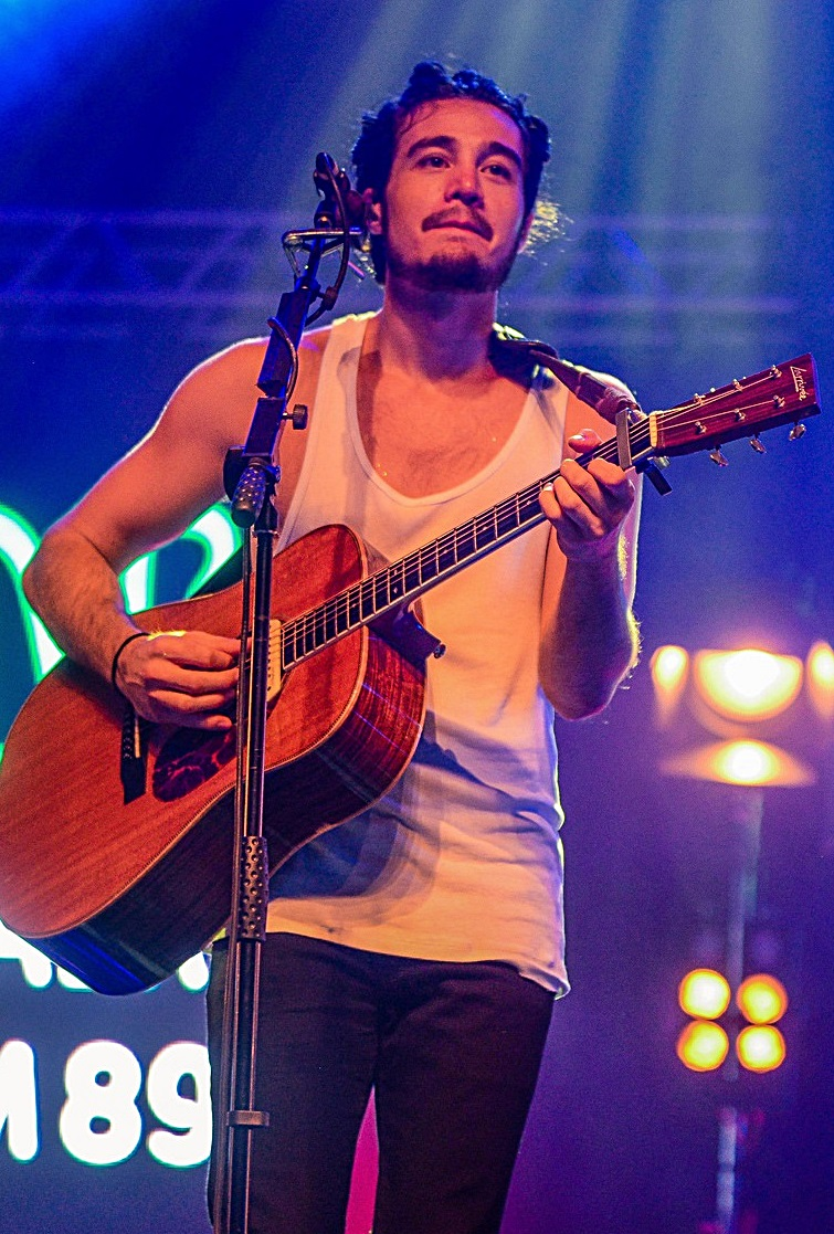 Tiago Iorc em show no festival Nova Brasil FM